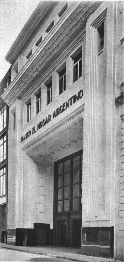 Fachada de la casa matriz del Banco El Hogar Argentino, una de las primeras obras de importancia del arquitecto Alejandro Virasoro en estilo Art Decó. Hoy es un edificio anexo de la casa central del Banco Santander Río. Bartolomé Mitre 575. Buenos Aires, Argentina.